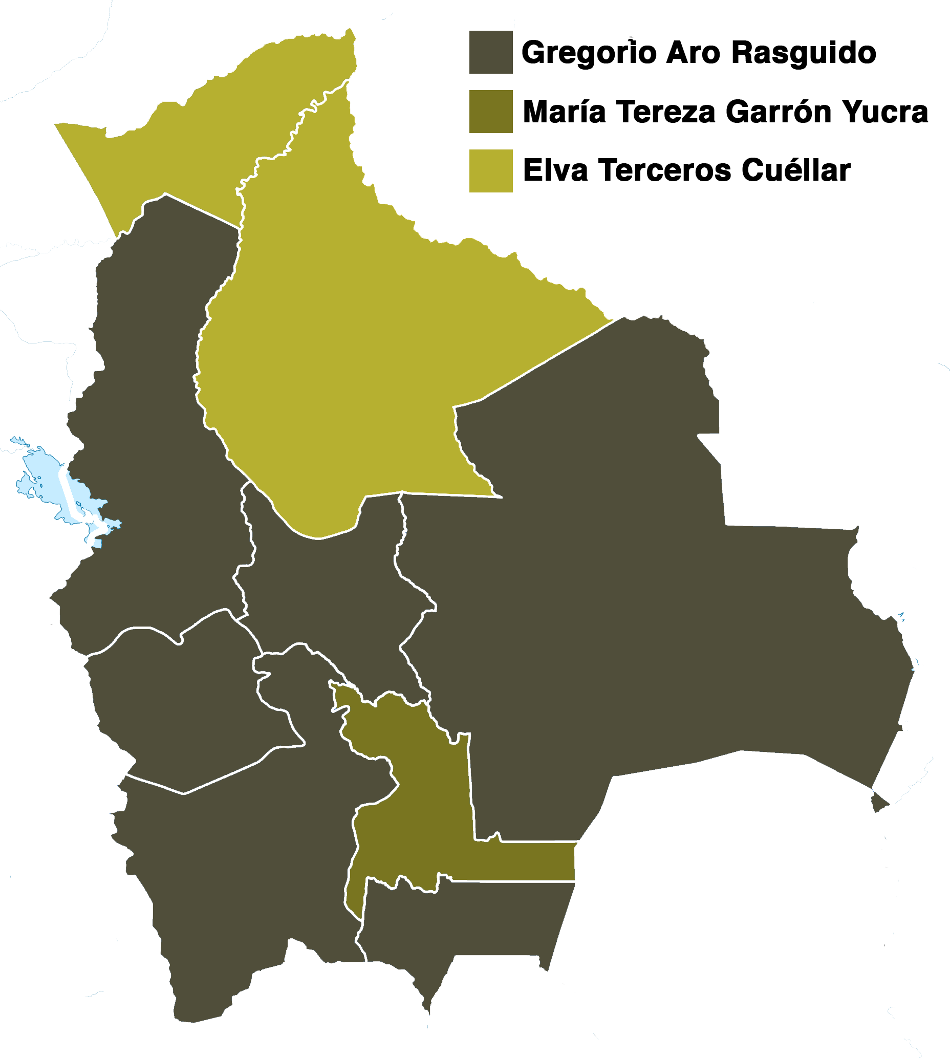 Candidato más votado por departamento en las elecciones de miembros del Tribunal Agroambiental, parte de las elecciones judiciales de Bolivia de 2017